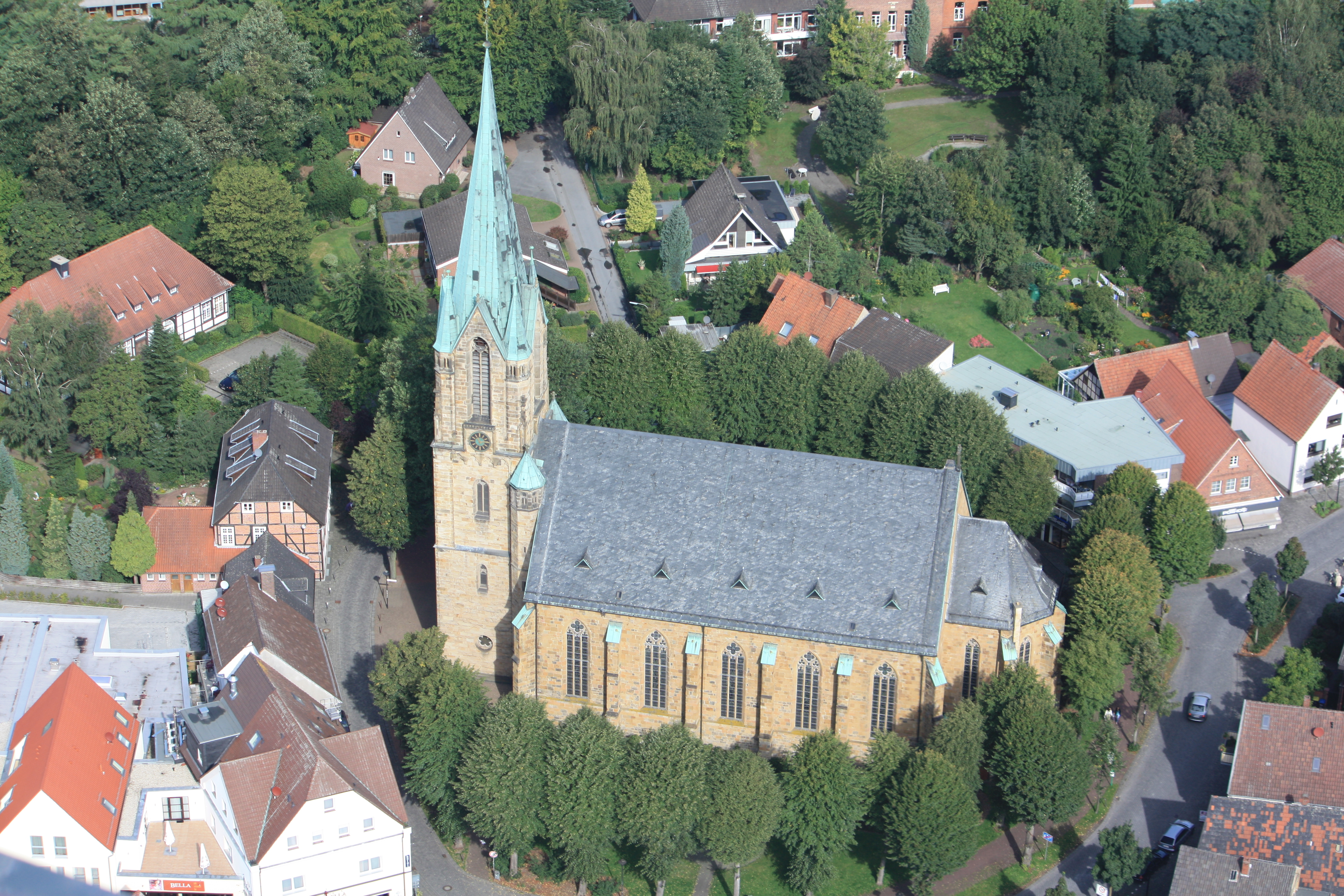 St. Lucia in Harsewinkel